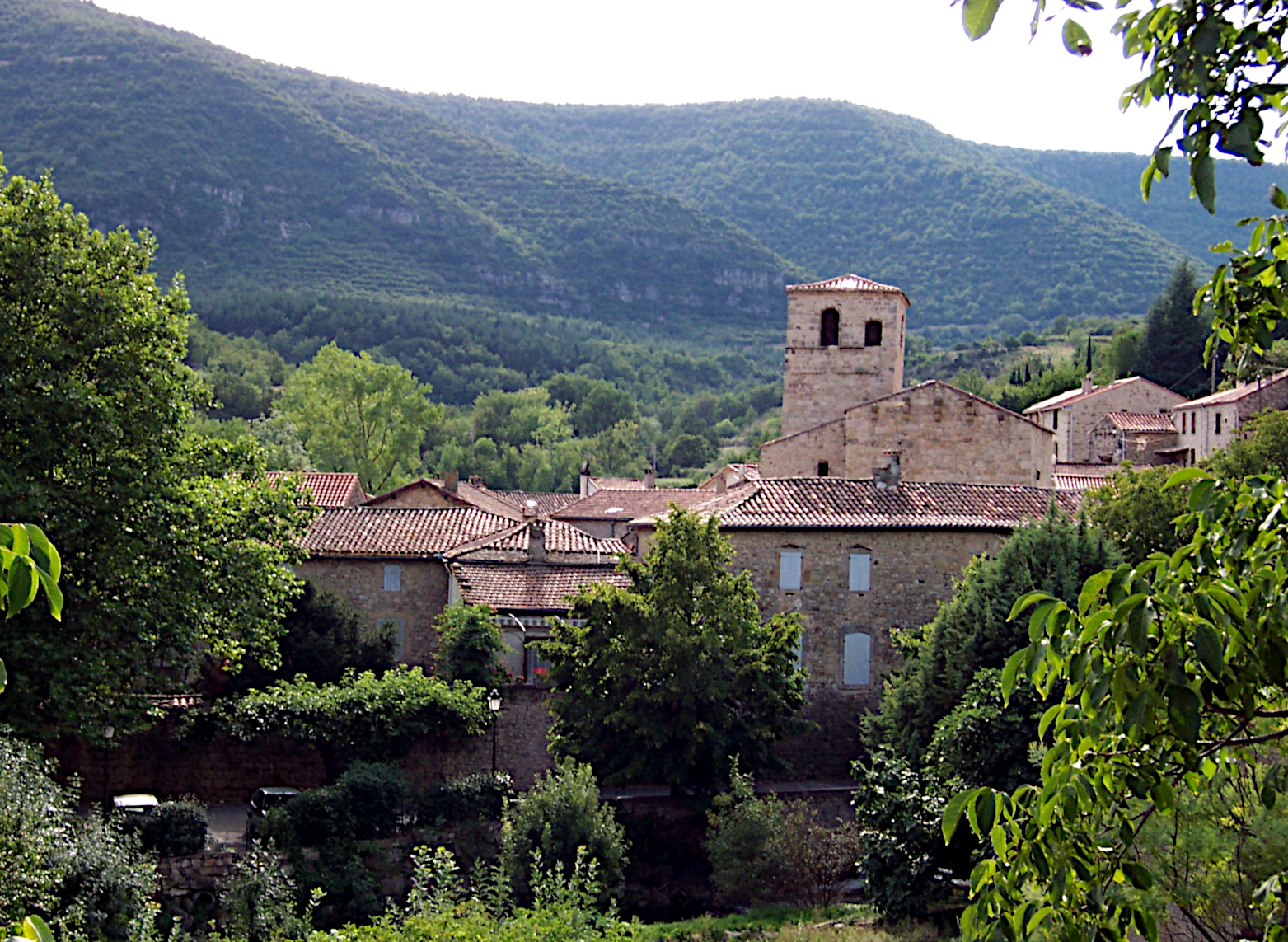 Vue sur le village de Lauroux (Hérault)